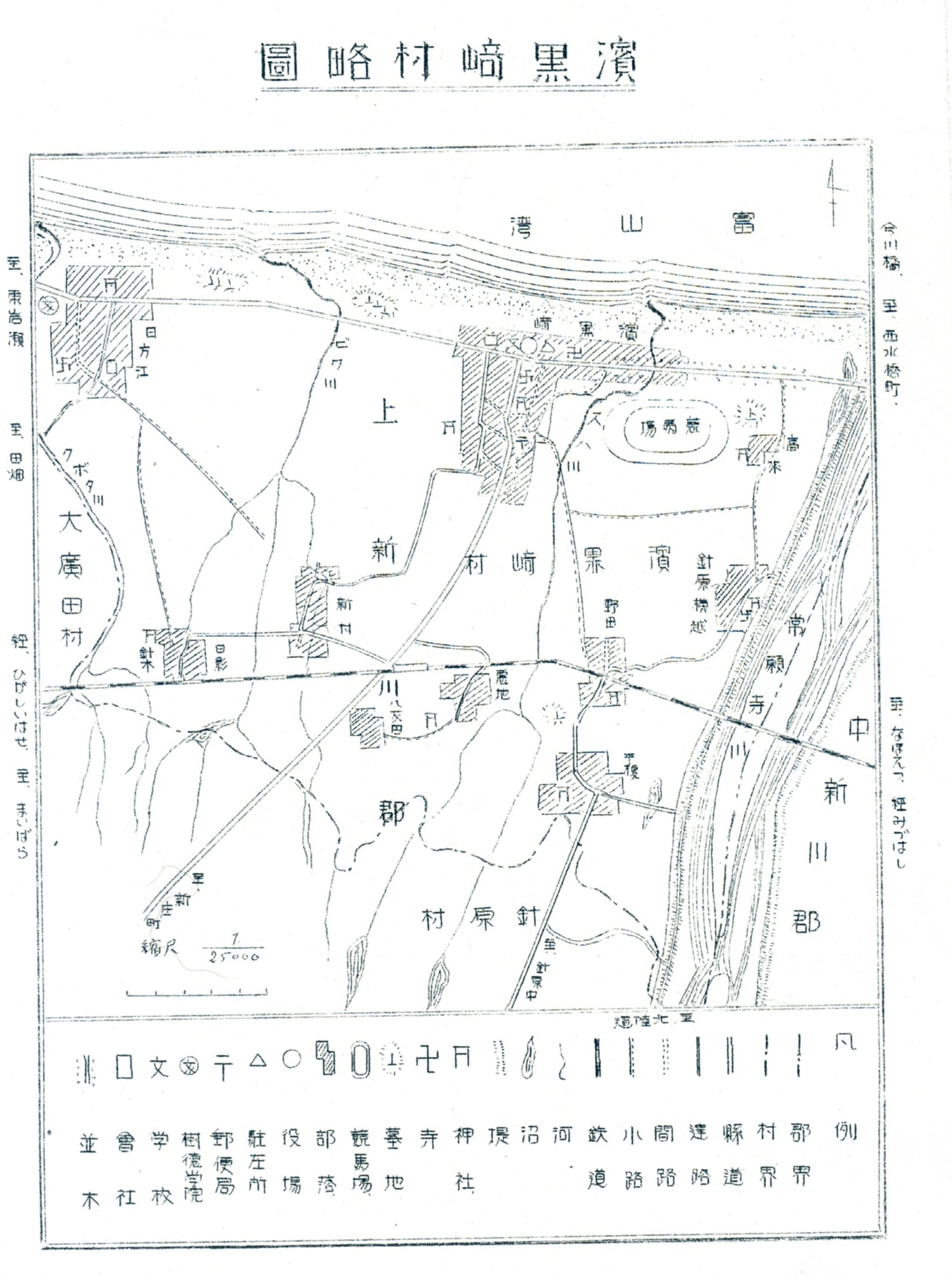 浜黒崎村略図